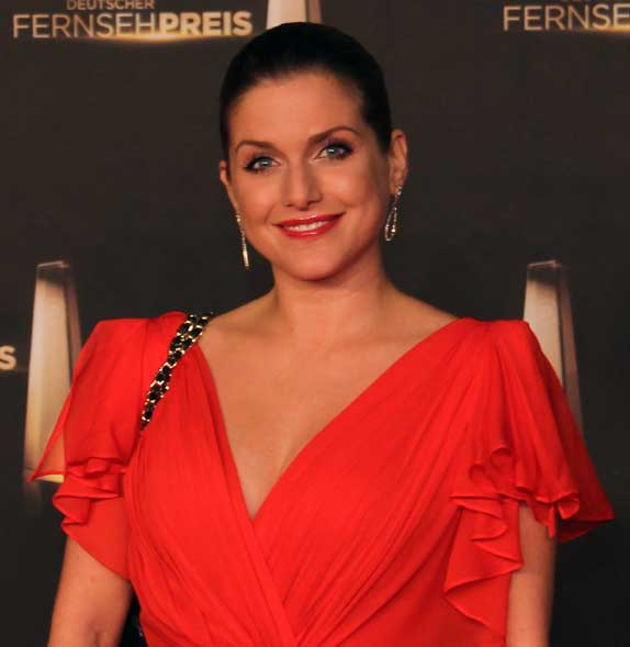 Jeanette Biedermann beim Deutschen Fernsehpreis 2012